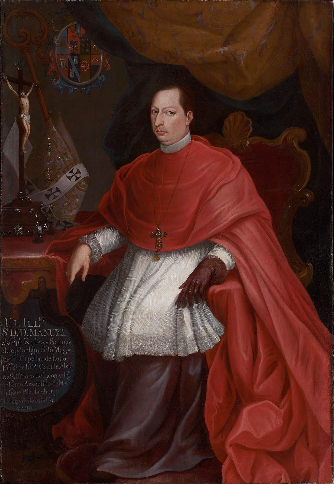 Retrato del Arzobispo Don José Rubio y Salinas